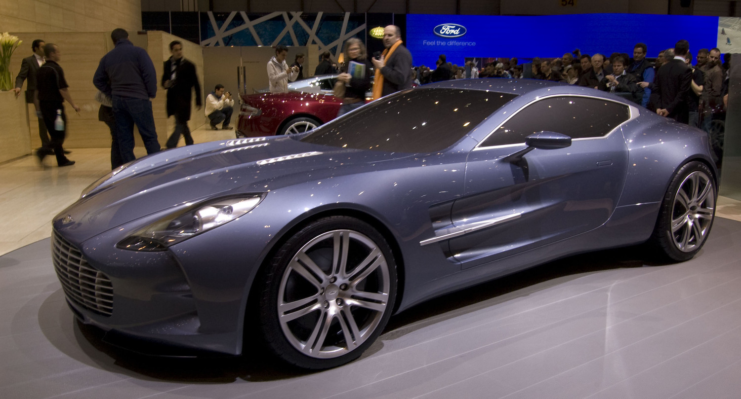 Aston Martin One 77 en el Salón de Ginebra 2009.